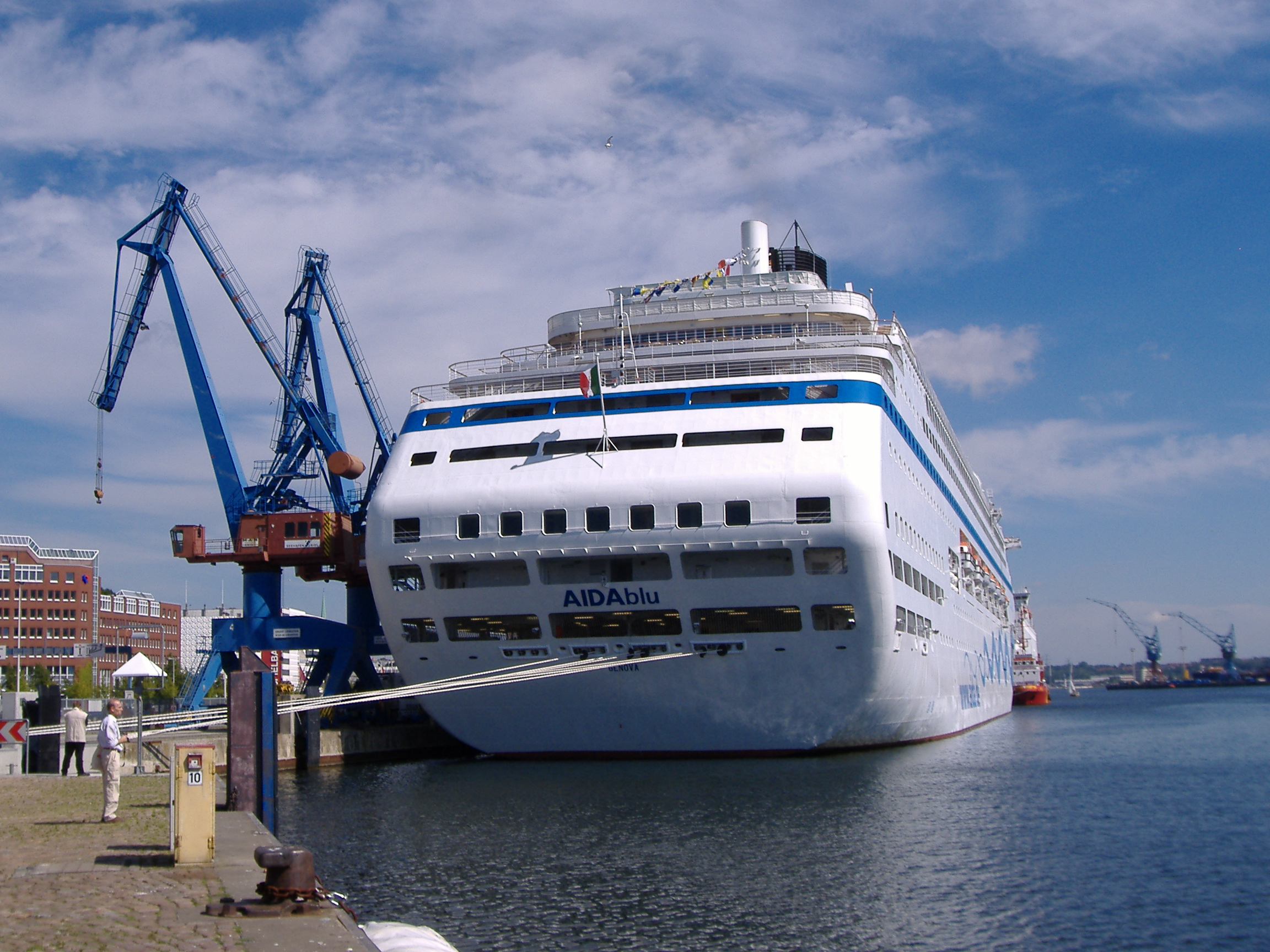 vormalige AIDAblu 2006 im Kieler Hafen